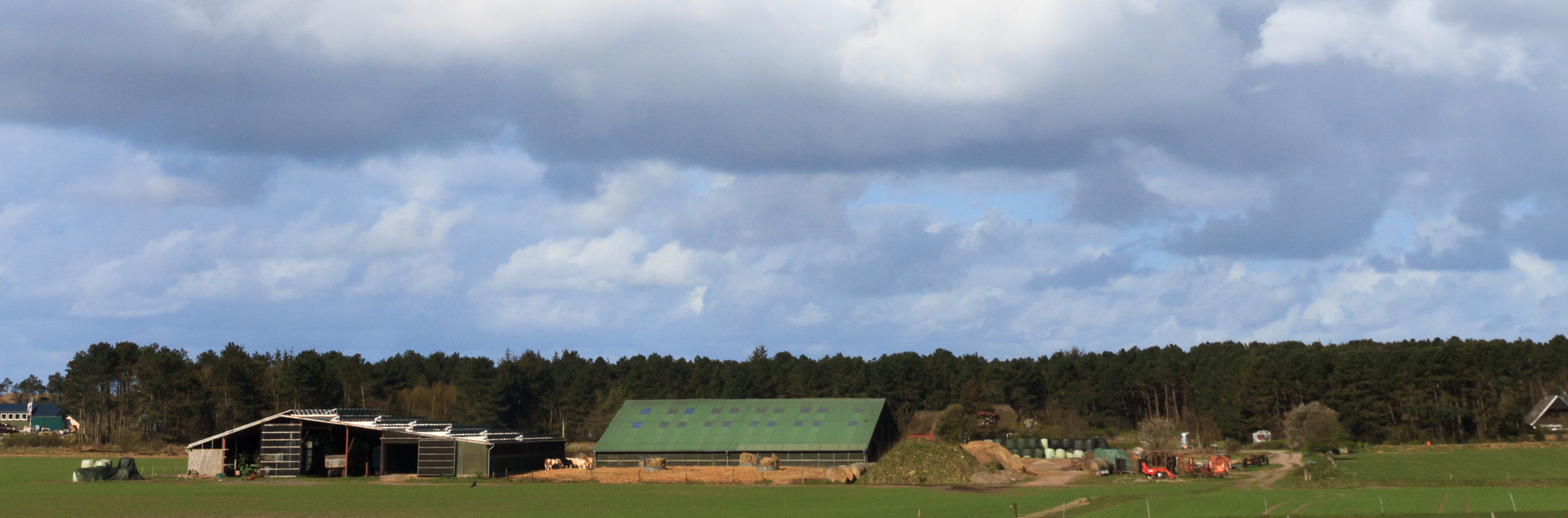 Bauernhof in Süddorf